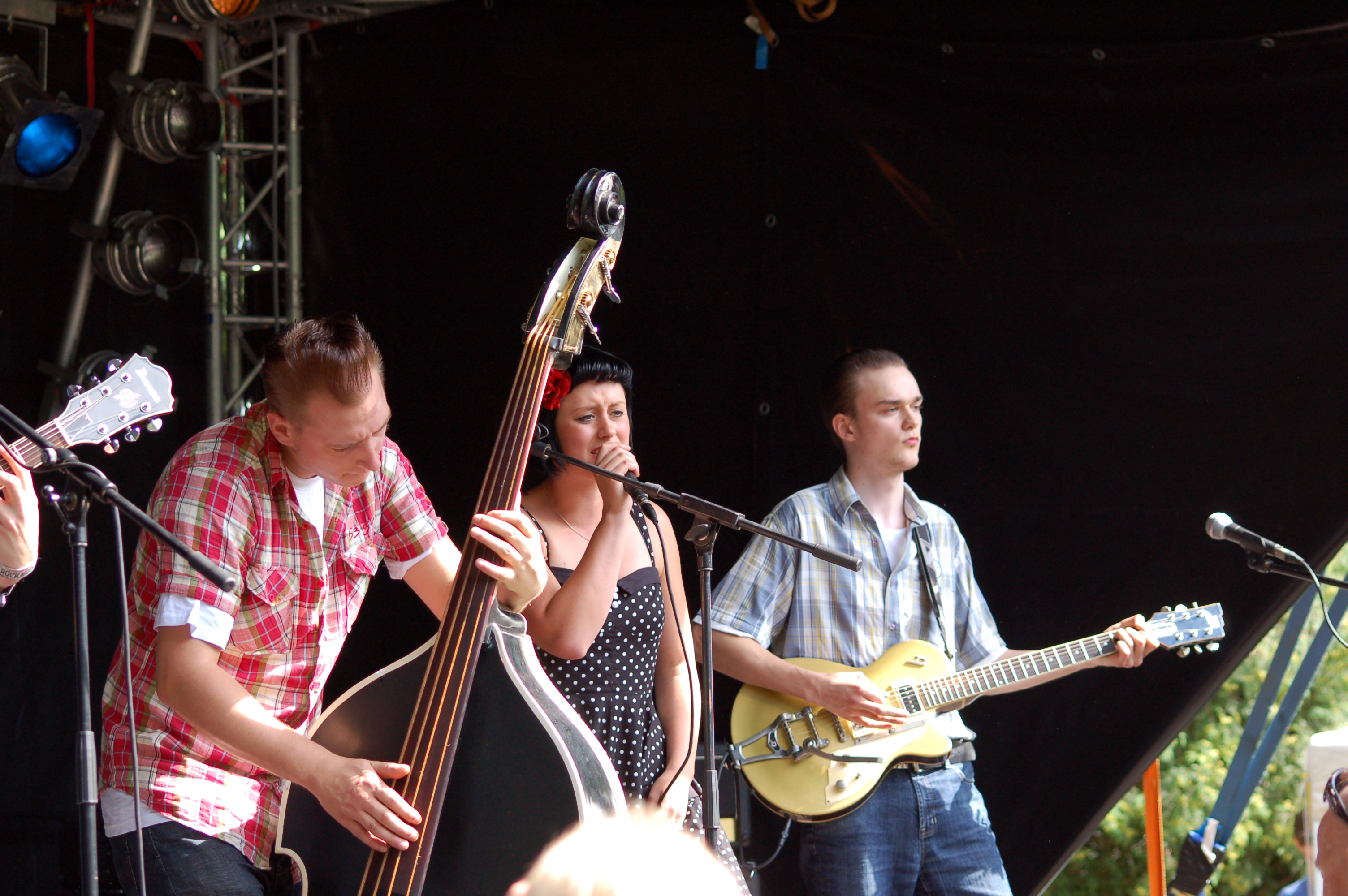 Rock A Radio (Rockabilly aus Elmshorn) beim 1. Rock 'N' Rose Festival in Uetersen.